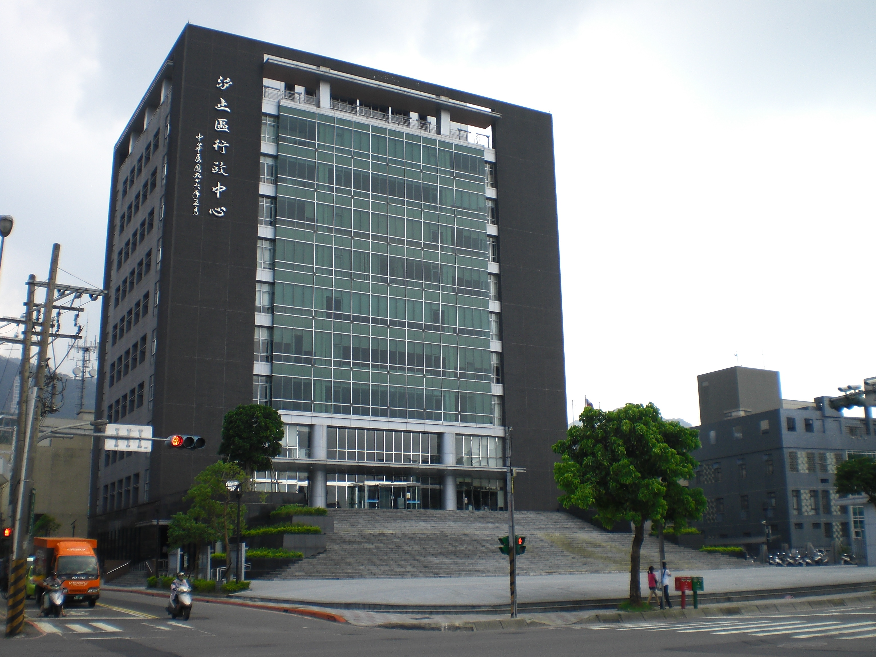 汐止區行政中心，位於新北市汐止區新台五路一段268號。